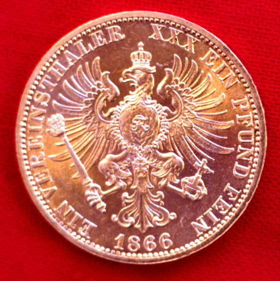 Rückseite eines preußischen Vereinstalers